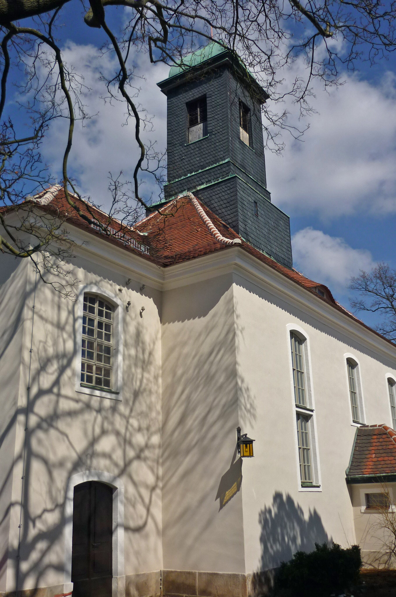 Kirche in Altklotzsche (nach der Sanierung) in Dresden-Klotzsche